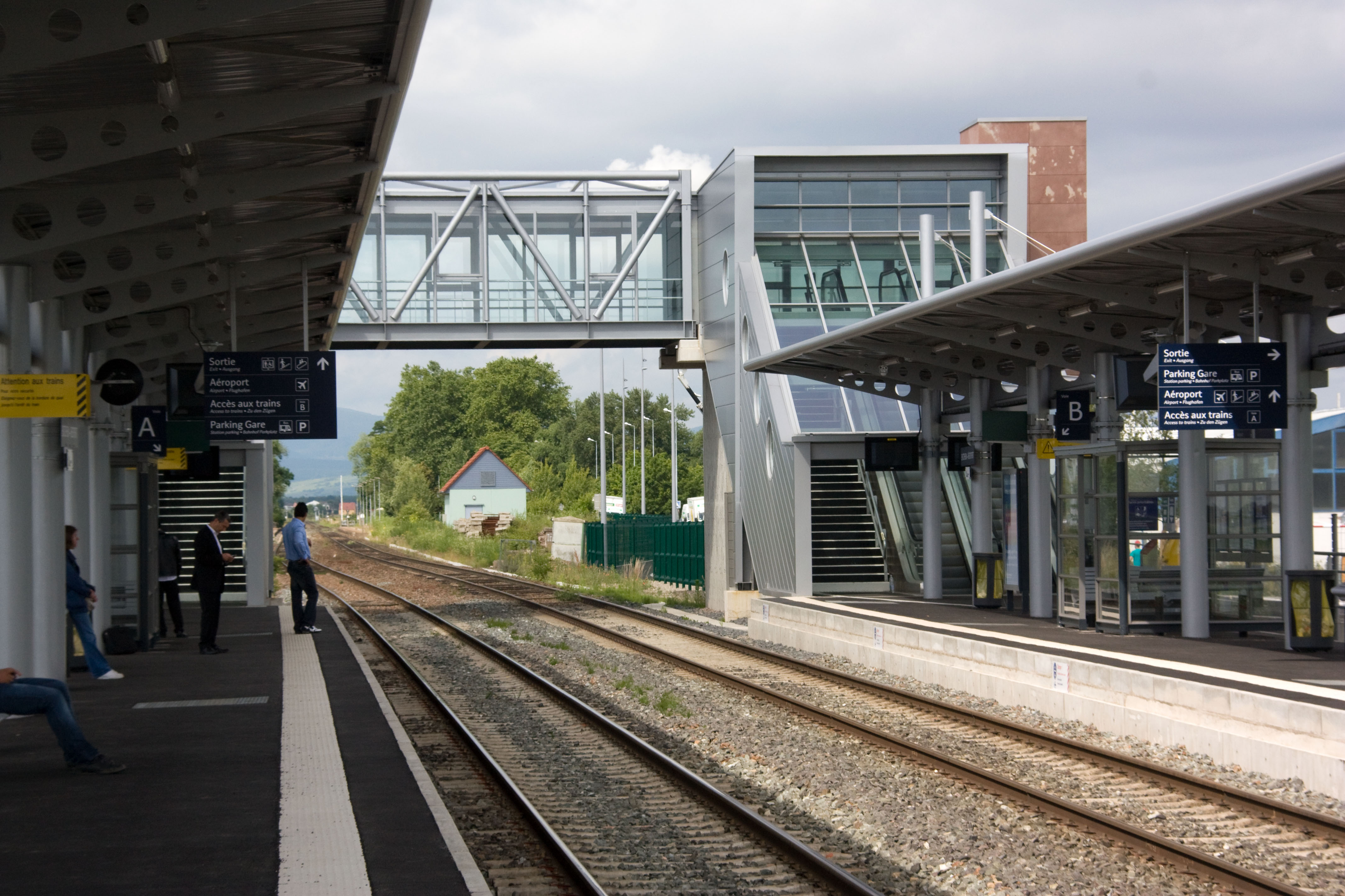 Gare d'Entzheim-Aéroport (aéroport de Strasbourg-Entzheim), département du Bas-Rhin. France